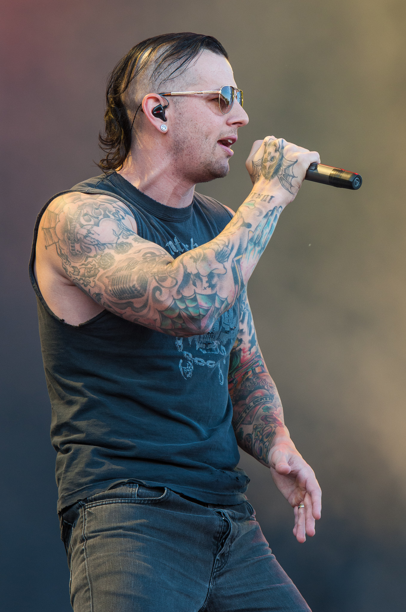 ARGO-Konzerte,Avenged Sevenfold,Konzert,Livekonzert,Livemusik,M. Shadows,Matthew Charles Sanders,Musik,RiP,Rock im Park 2014